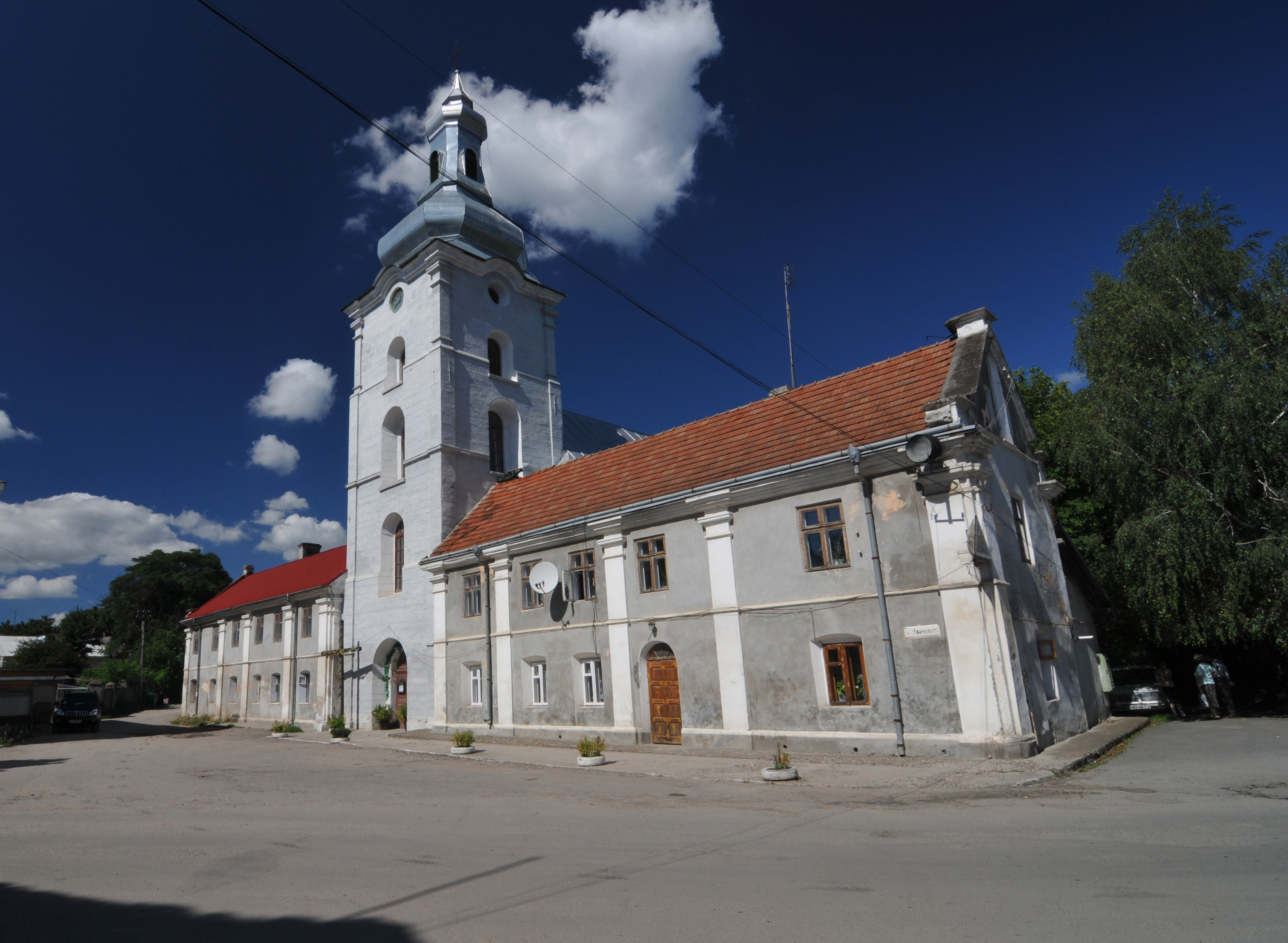 Заліщики, костел св.Станіслава